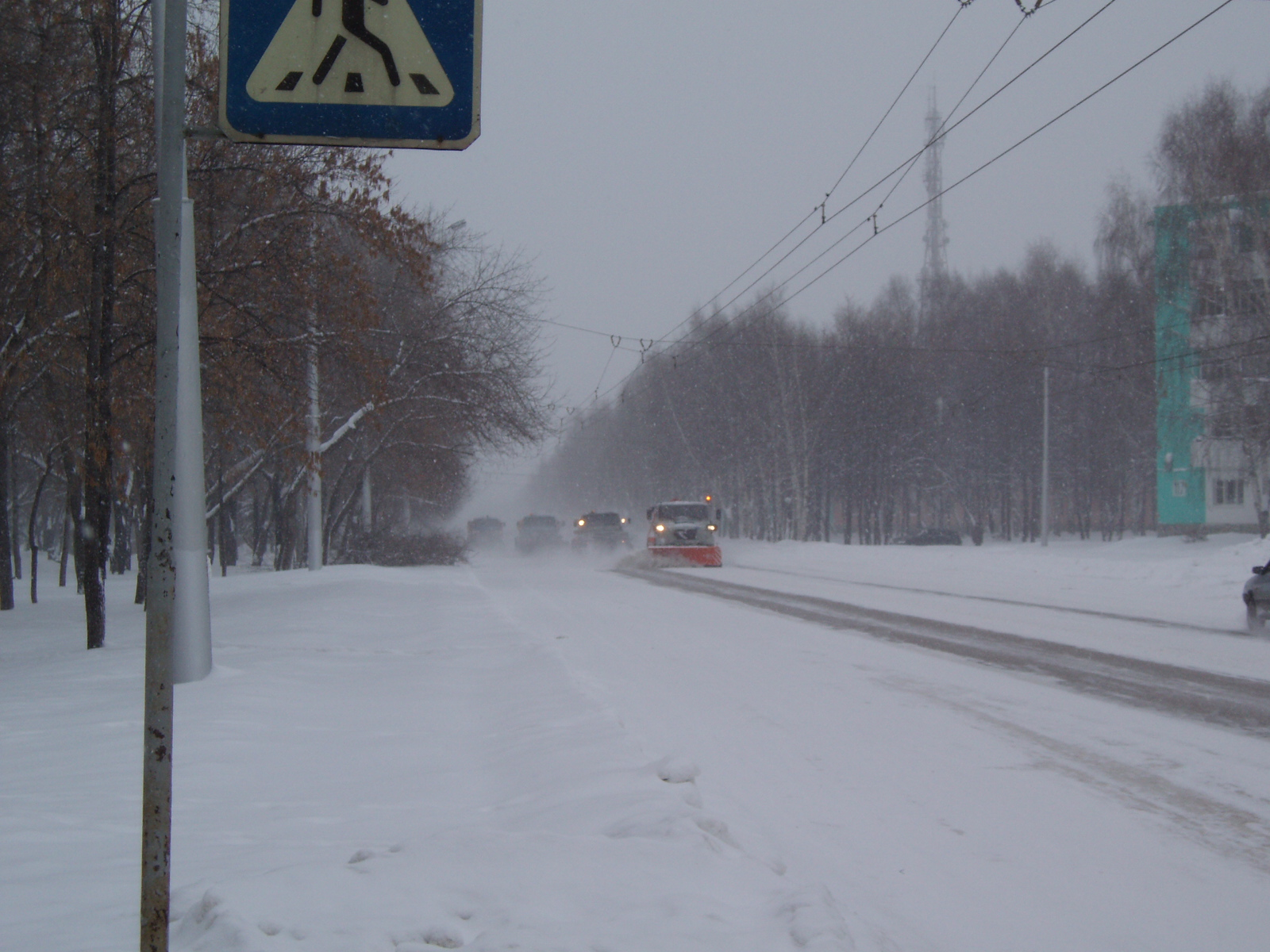 Зимний Стерлитамак